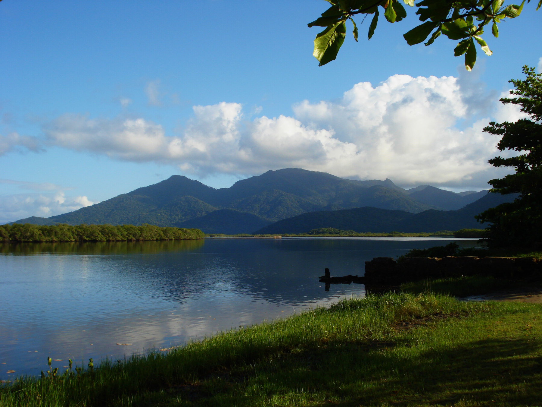 Amanhecer na Praia de Marujá na Ilha do Cardoso